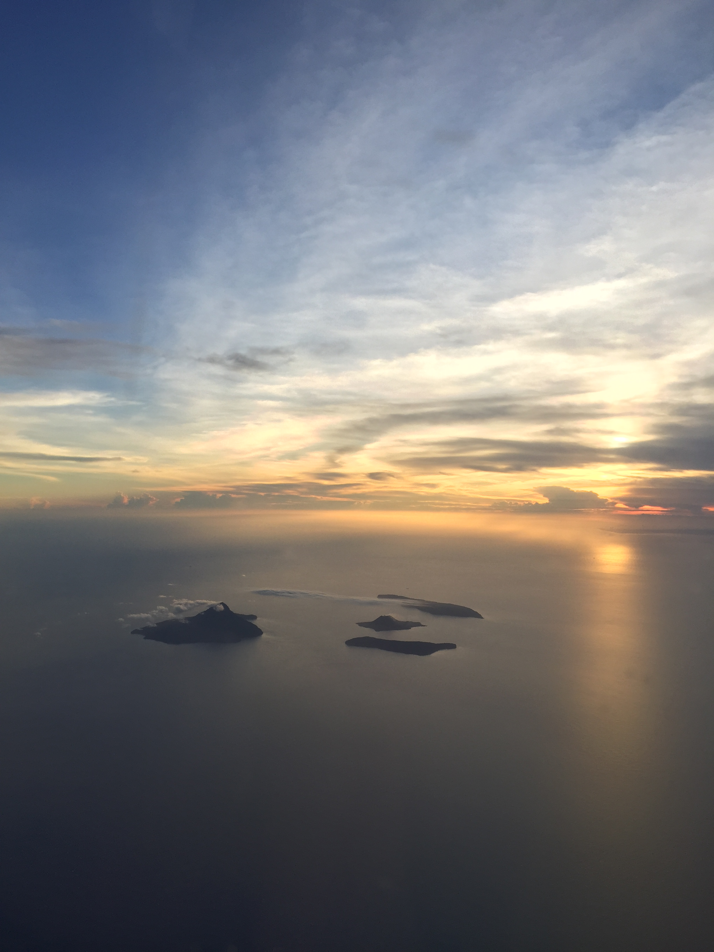 Gugusan Pulau Krakatau terletak di daerah Selat Sunda, dan masih termasuk ke dalam Provinsi Lampung, Sumatera Selatan. Untuk Pulau Anak Krakataunya sendiri adalah sebuah pulau volkanik kecil yang masih aktif dan terletak di tengah-tengah antara Pulau Sertung, Pulau Krakatau Kitjil, dan Pulau Rakata. Pulau ini merupakan pulau yang mucul dari letusan Gunung Krakatau pada tahun 1883 dan masih bertumbuh ketinggiannya sampai sekang.